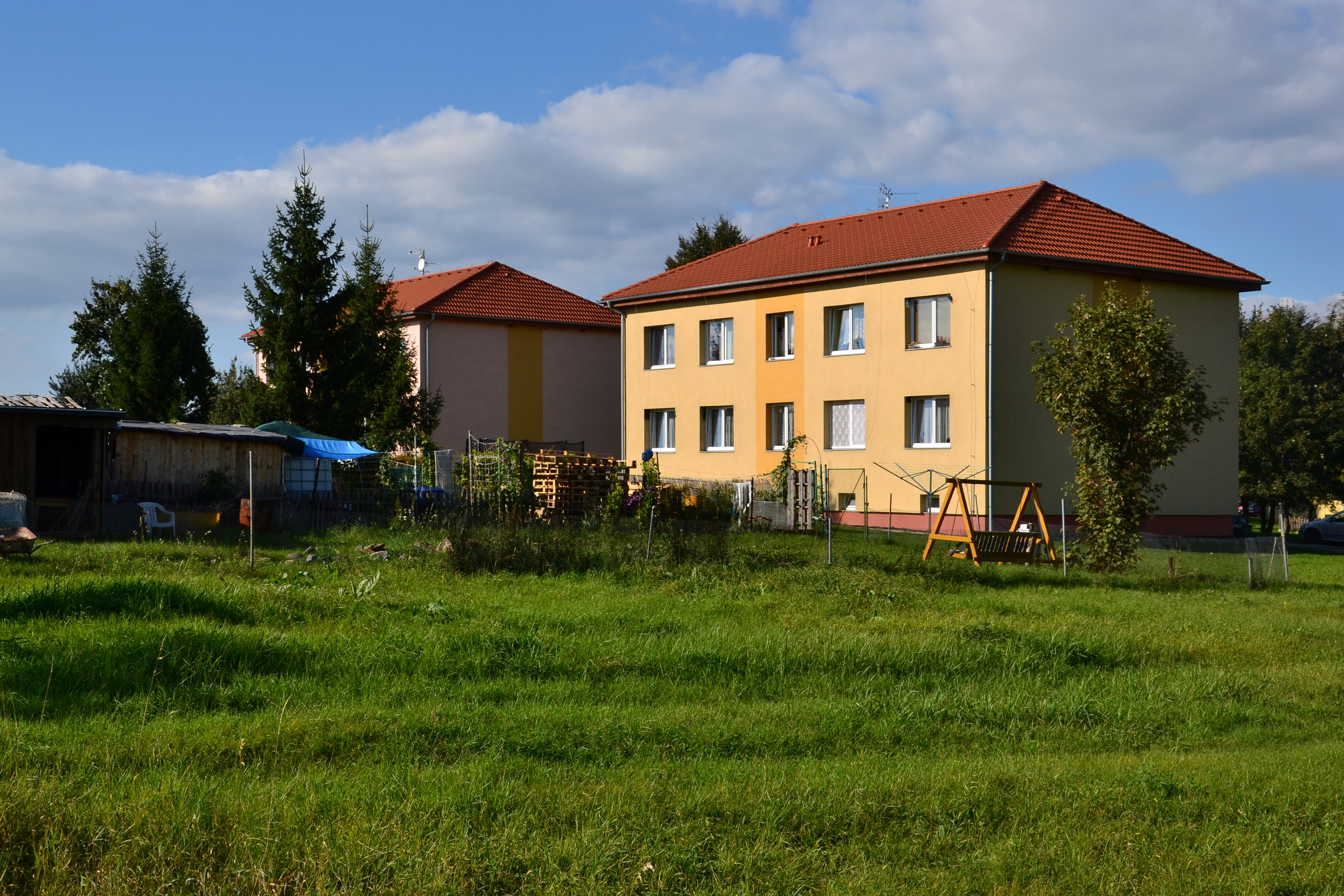 Střezov - bytový dům